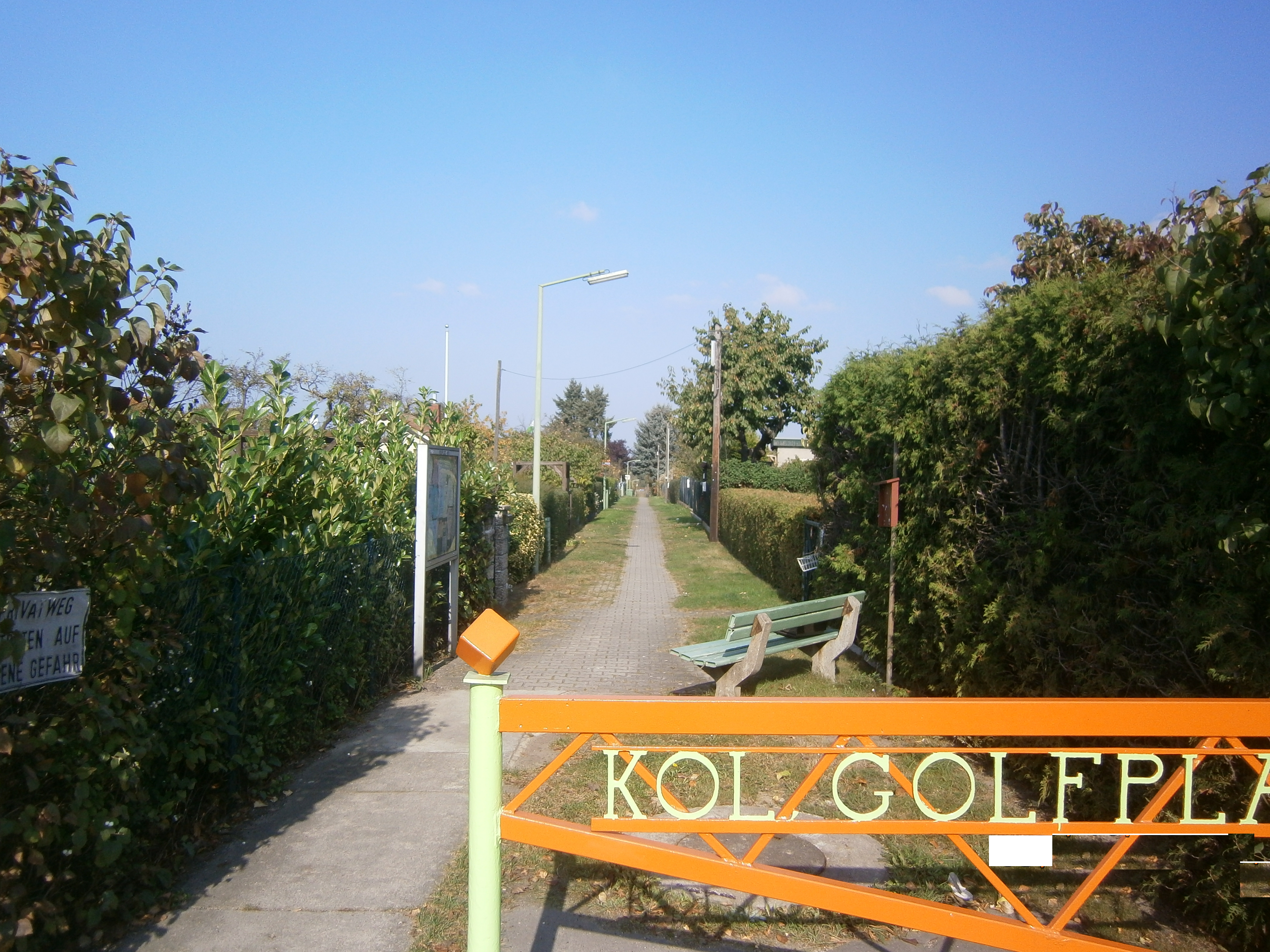 Der Eingang zur Dauerkolonie Golfplatz e.V. in Berlin-Westend an der Nordkante des Teltows vom Spandauer Damm aus.